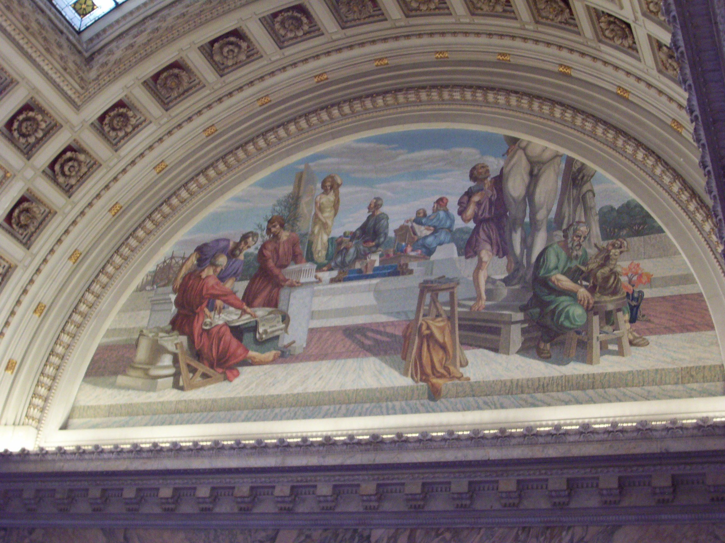 Detalle de un fresco en el Salón de los Pasos Perdidos del Palacio Legistativo, Montevideo, Uruguay.